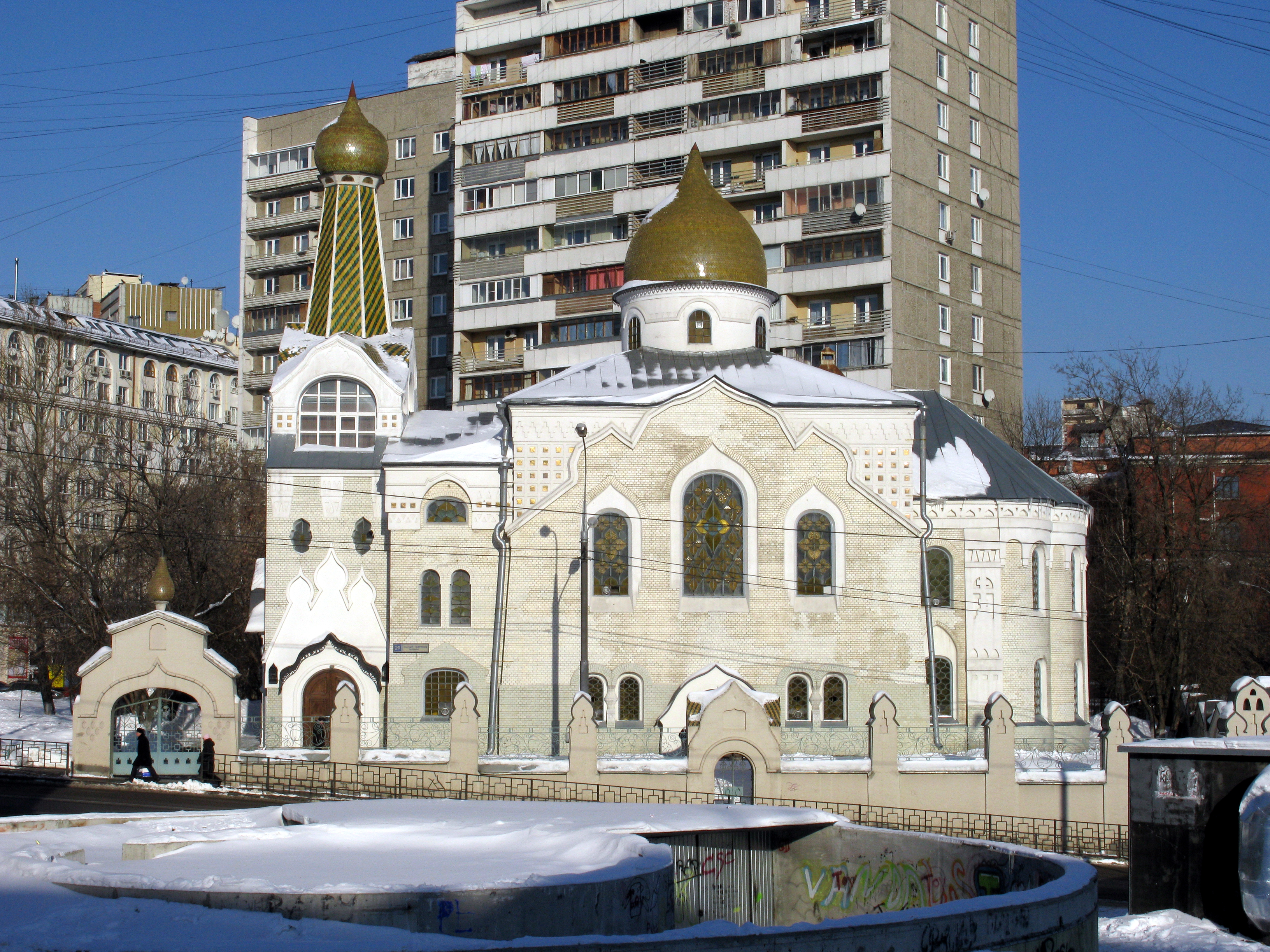 Старообрядческая церковь Покрова Пресвятой Богородицы Покрово-Успенской общины